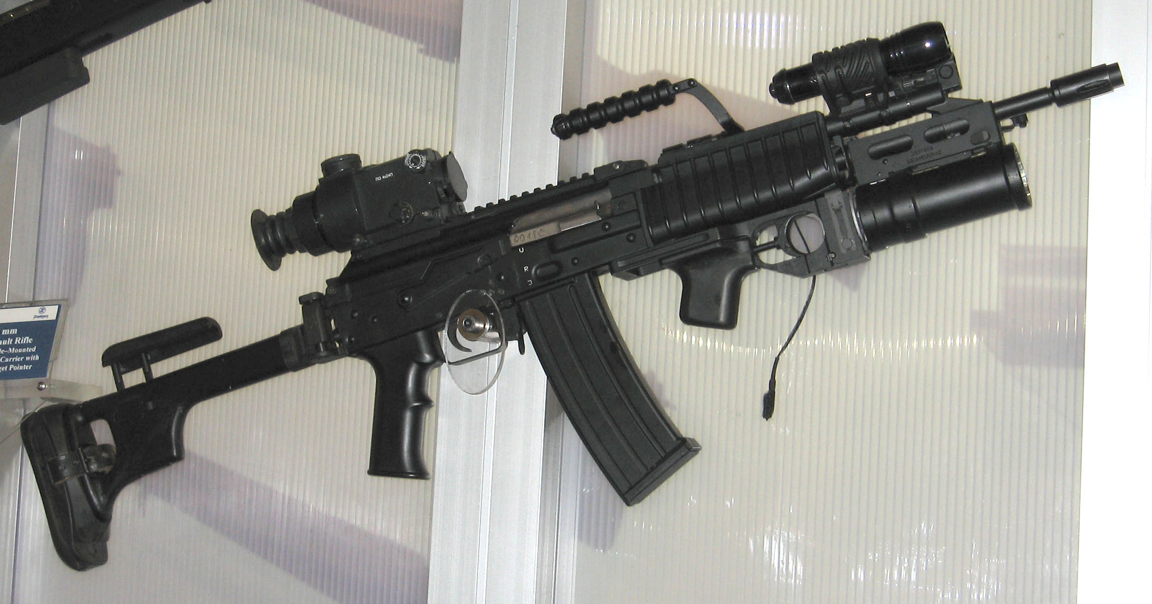 Serbian assault rifle Zastava M21S, 5.56 mm.